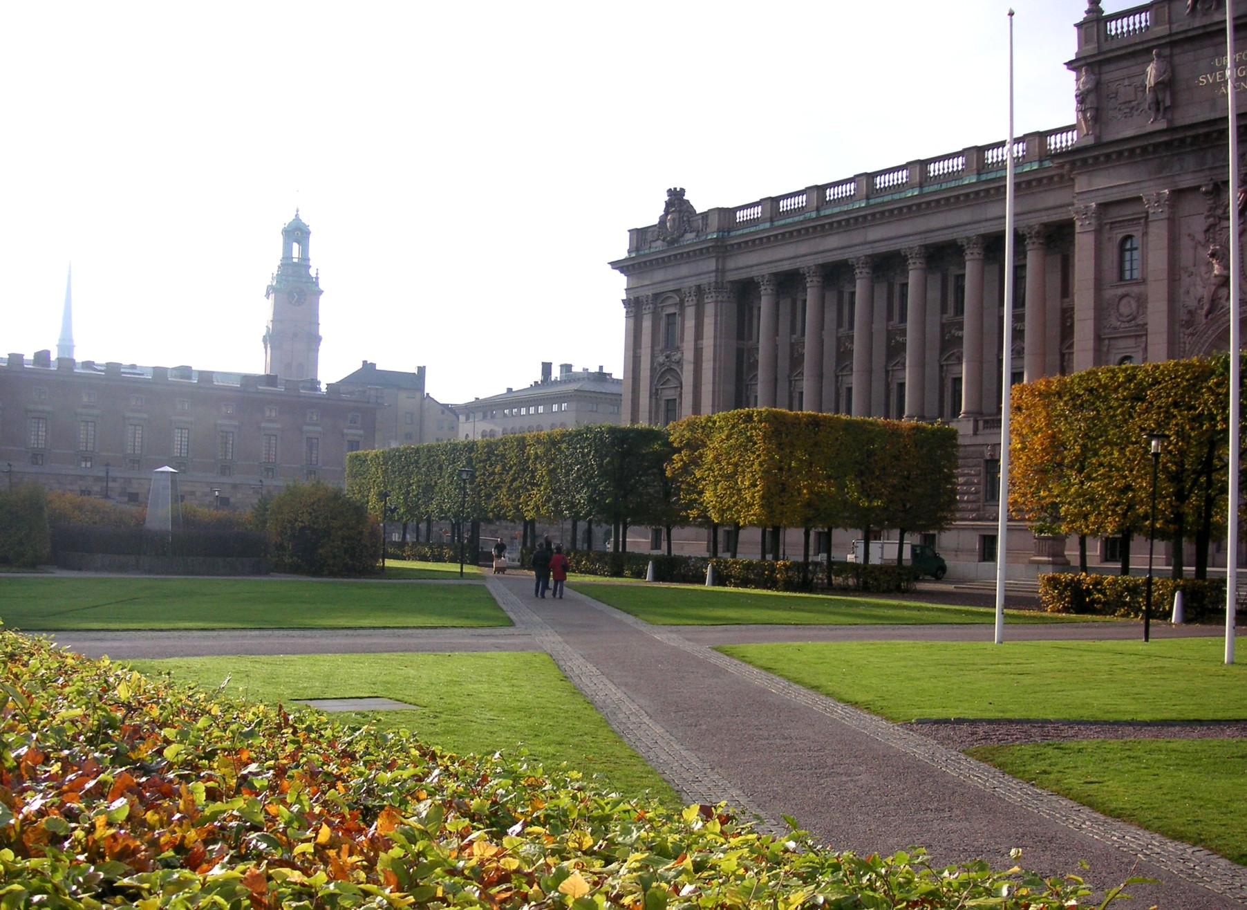 Riksplan framför Risdagshuset i Stockholm